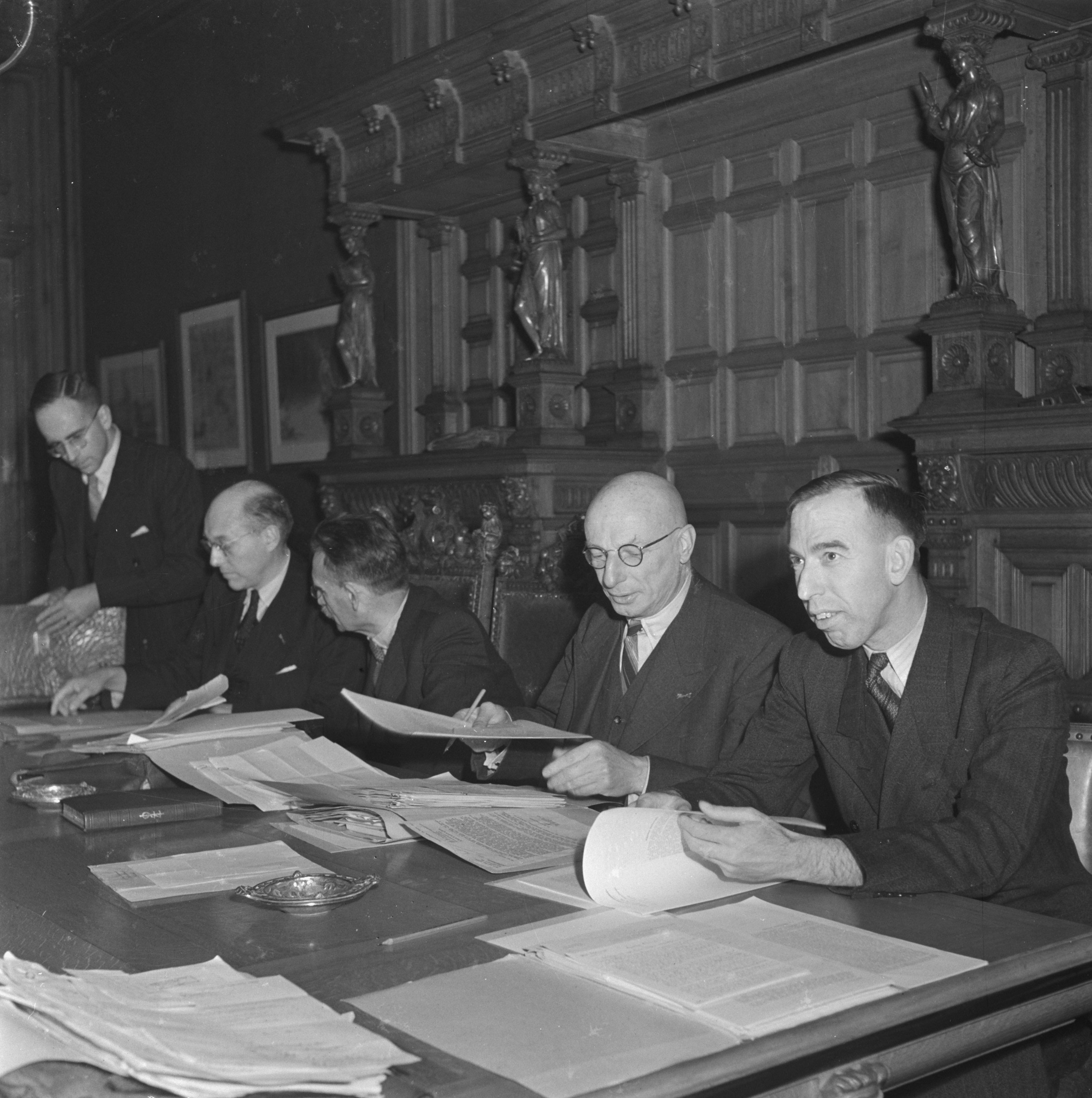 Collectie / Archief : Fotocollectie Anefo Reportage / Serie : Ministerraad [1945] Beschrijving : Ministerraad. Vlnr: secretaris van de ministerraad P. Sanders , W. Schermerhorn (minister-president), , W. Drees (Sociale Zaken), G. van der Leeuw (Onderwijs, Kunsten en Wetenschappen), H. Vos (Handel en Nijverheid) Datum : 1945 Locatie : Den Haag, Zuid-Holland Trefwoorden : ministerraden, ministers Persoonsnaam : Drees, Willem (sr.), Leeuw, G. van der, Sanders, P., Schermerhorn, W., Vos, Hein Fotograaf : Fotograaf Onbekend / Anefo, [onbekend] Auteursrechthebbende : Nationaal Archief Materiaalsoort : Negatief (zwart/wit) Nummer archiefinventaris : bekijk toegang 2.24.01.03 Bestanddeelnummer : 900-8597